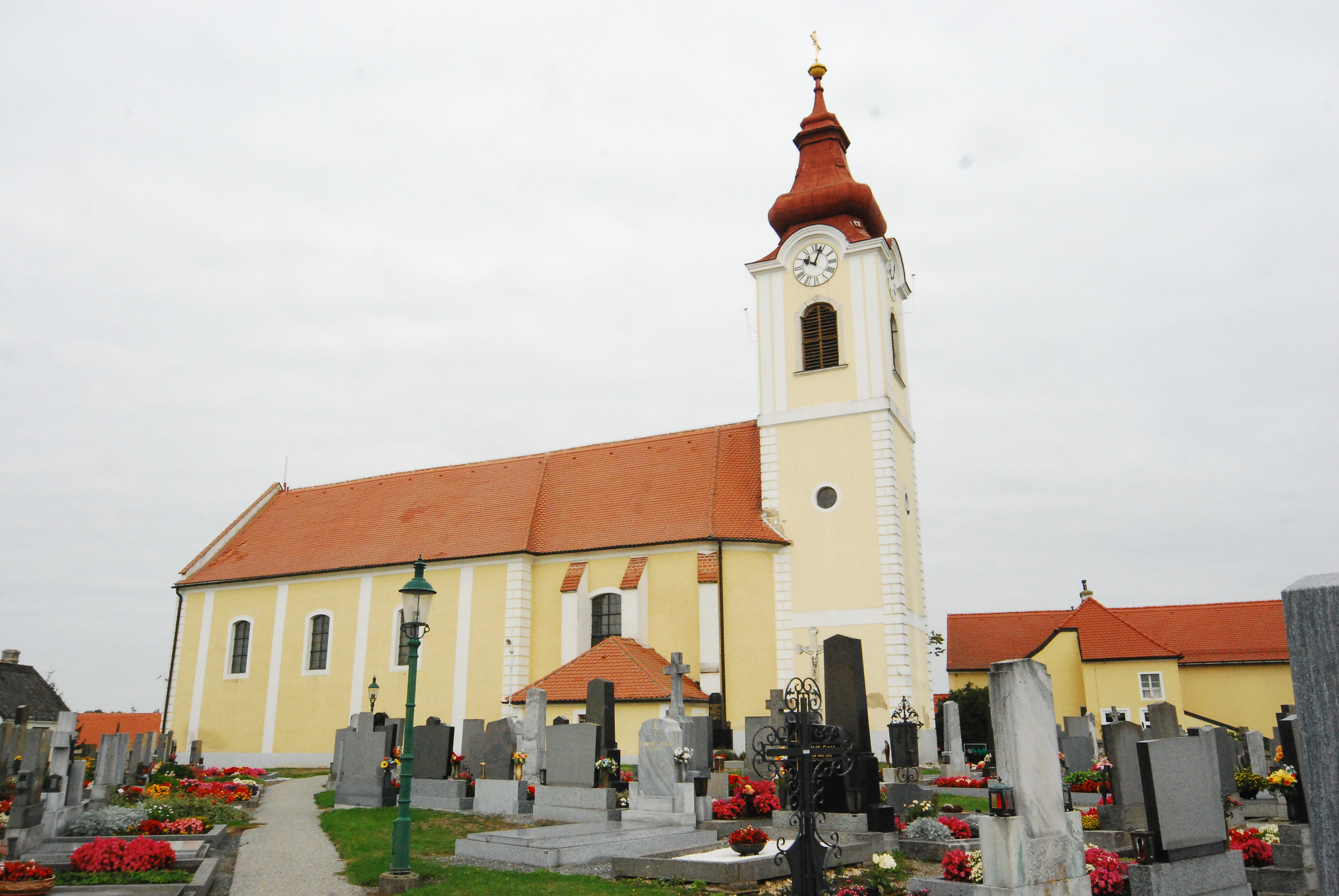 Kath. Pfarrkirche hl. Laurenz und Friedhof